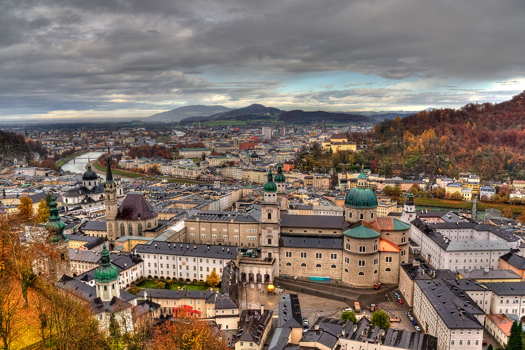 Salisburgo (Austria)